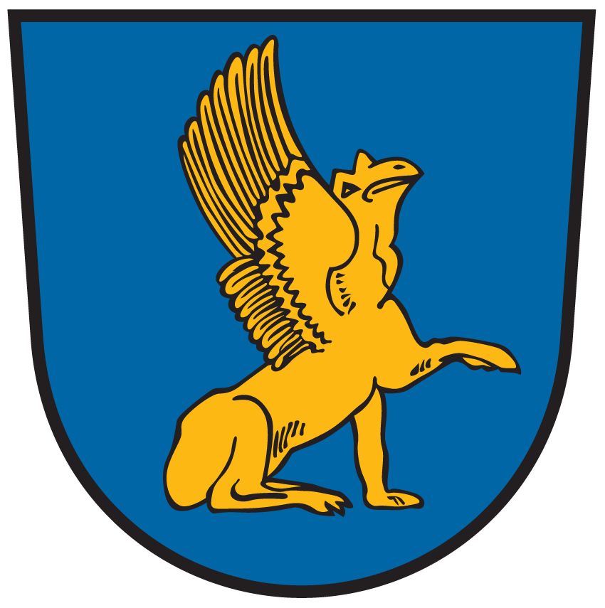 Wappen von Magdalensberg